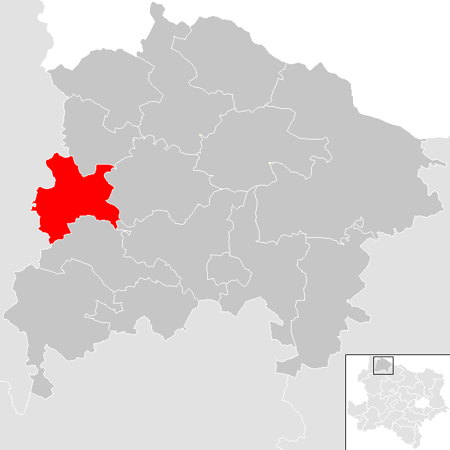 Bezirk Waidhofen an der Thaya